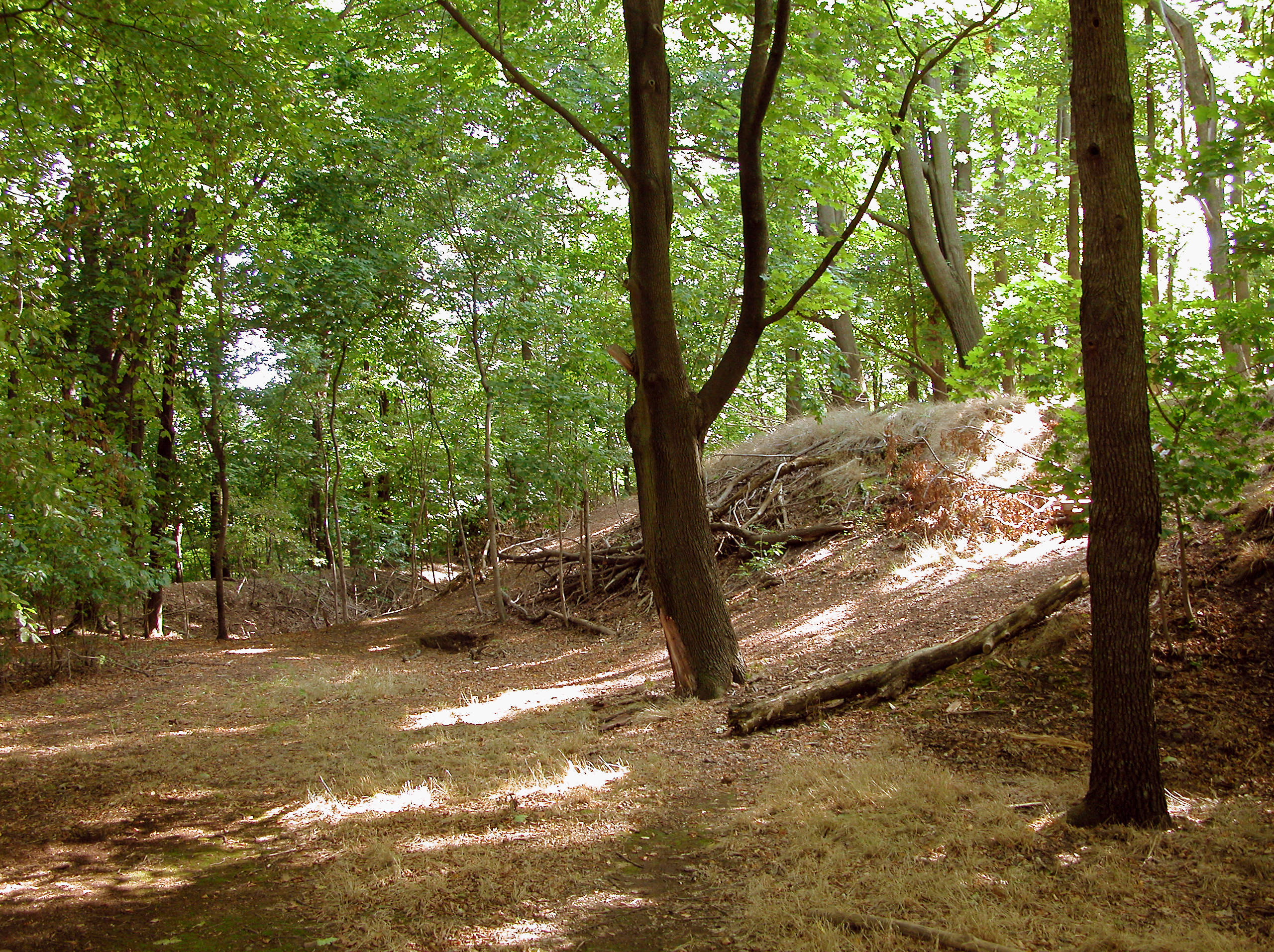 09.09.2008 01705 Pesterwitz (Freital) Am Burgwartsberg (GMP: 51.01733,13.652251): Castell Thorun. Vor 1206 errichtete der Burggraf von Dohna, Heinrich II., auf dem Burgwartsberg bei Pesterwitz widerrechtlich eine Burg, das Castell Thorun. Nur Erdwälle sind übrig. [DSCN34058.TIF]20080909170DR.JPG(c)Blobelt